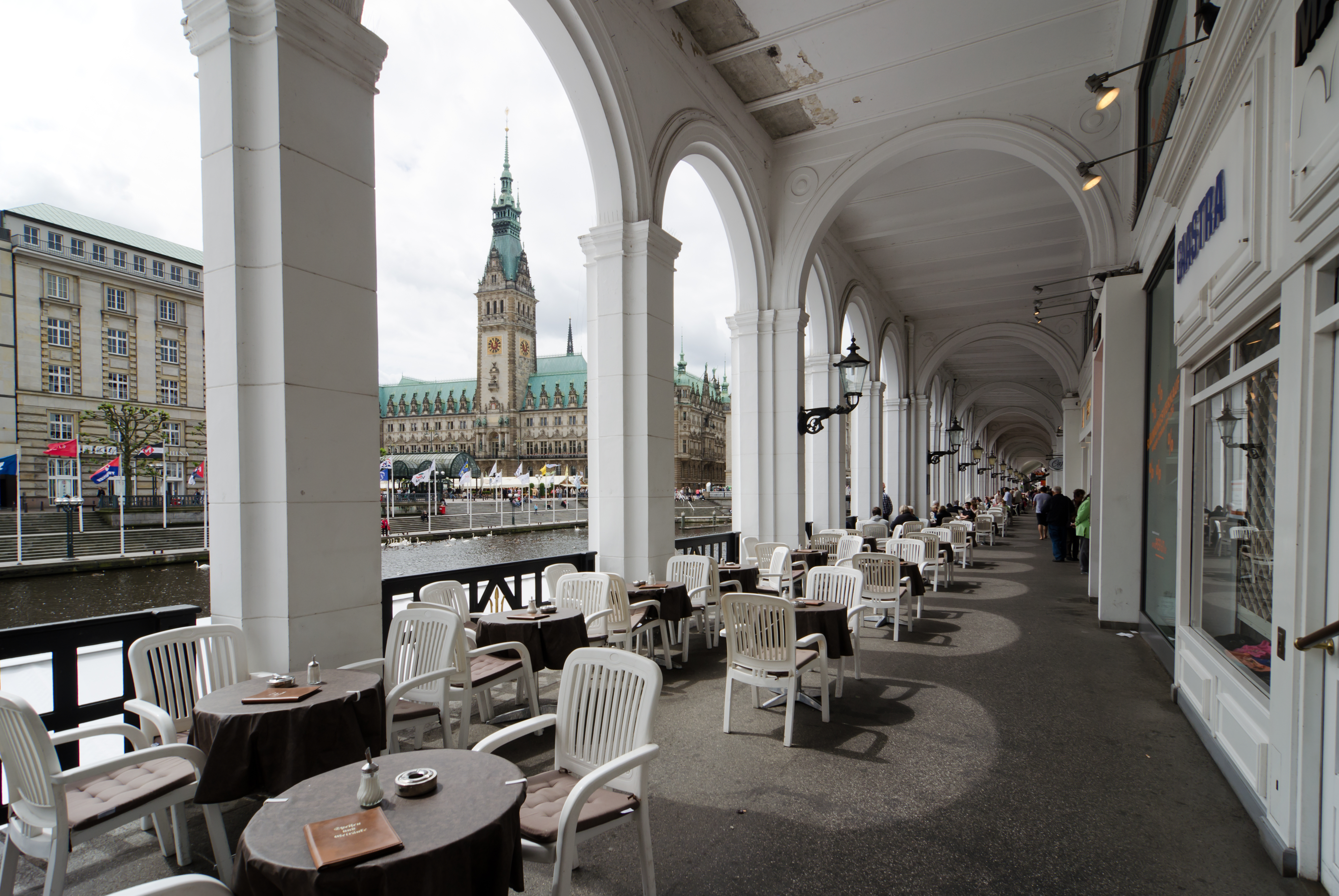 Hamburg Alsterarkaden